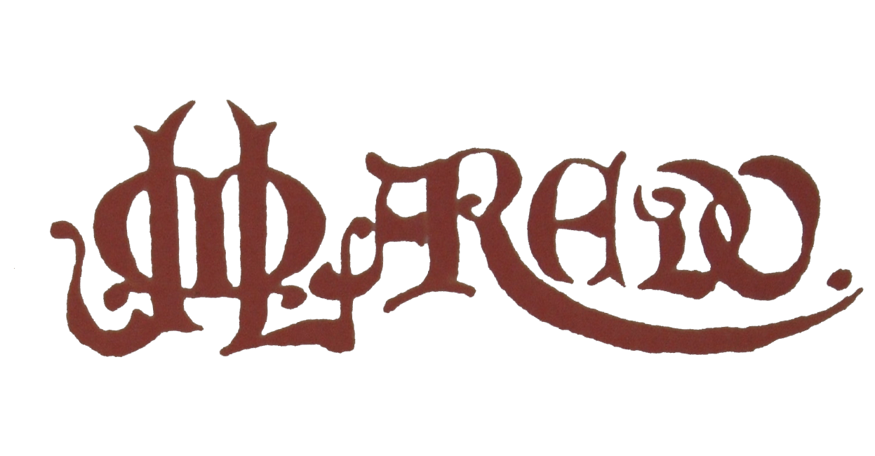 Firma artística de Manuel Laredo (1842-1896) realizada en 1887. Artista y político español.